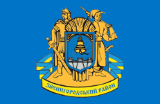 Прапор Звенигородського району